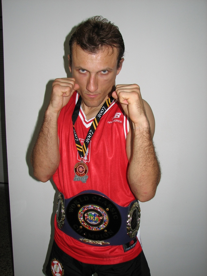 Brunon Sokołowski Mistrz Polski w Karate Kyokushin i Mistrz Świata w Kick-Boxingu